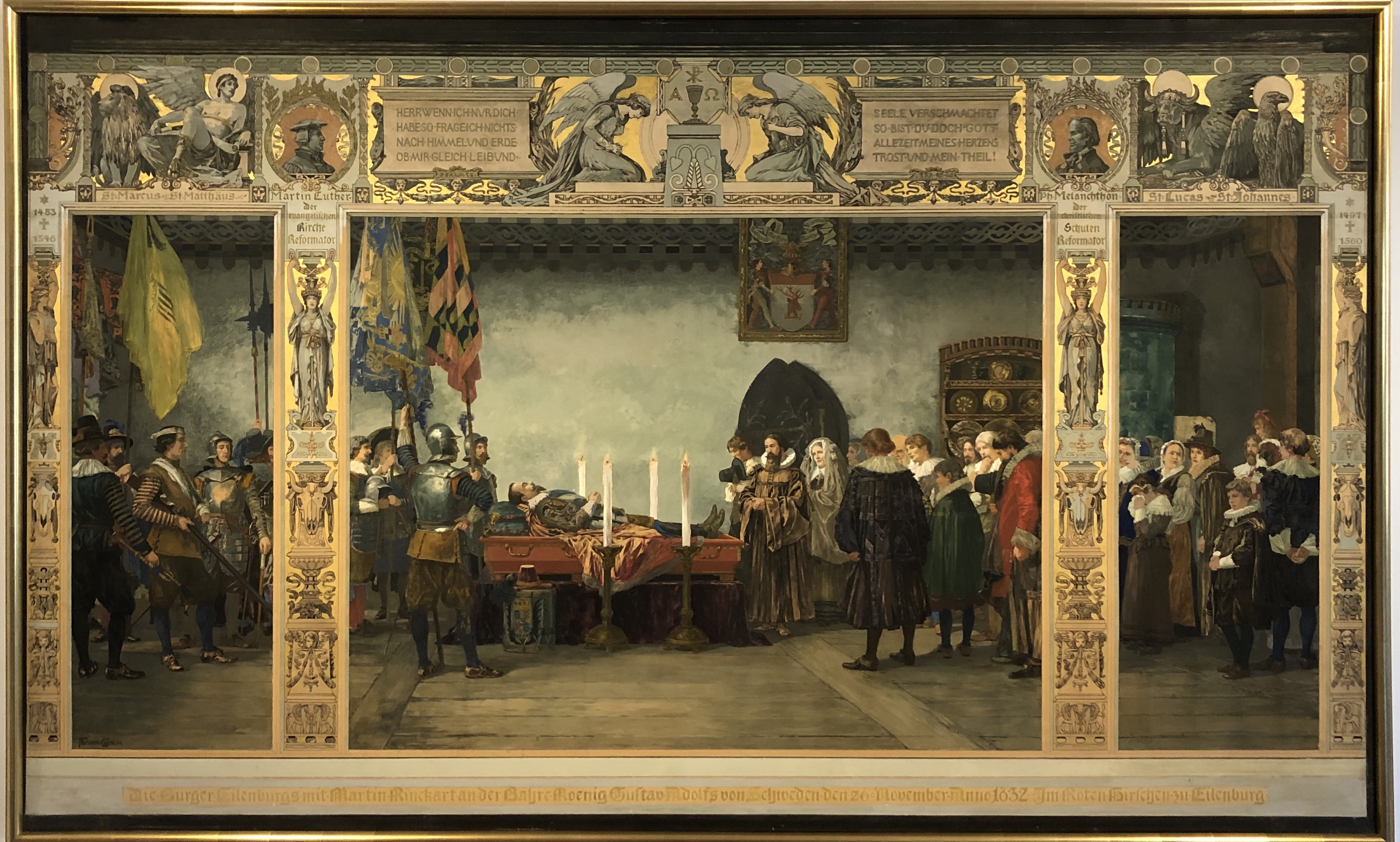 Triptychon von Ernst Albert Fischer-Cörlin (22. August 1853–vor 1916)[1]. Es zeigt die Aufbahrung des Schwedenkönigs Gustav II. Adolf im Gasthof „Zum Roten Hirsch“ in Eilenburg am 26. November 1632, nach seinem Tod in der Schlacht bei Lützen am 16. November 1632. An seinem Sarg steht der Eilenburger Archidiakon Martin Rinckart.